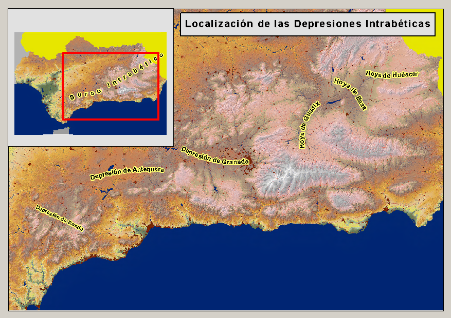 Localización de las Depresiones Intrabéticas